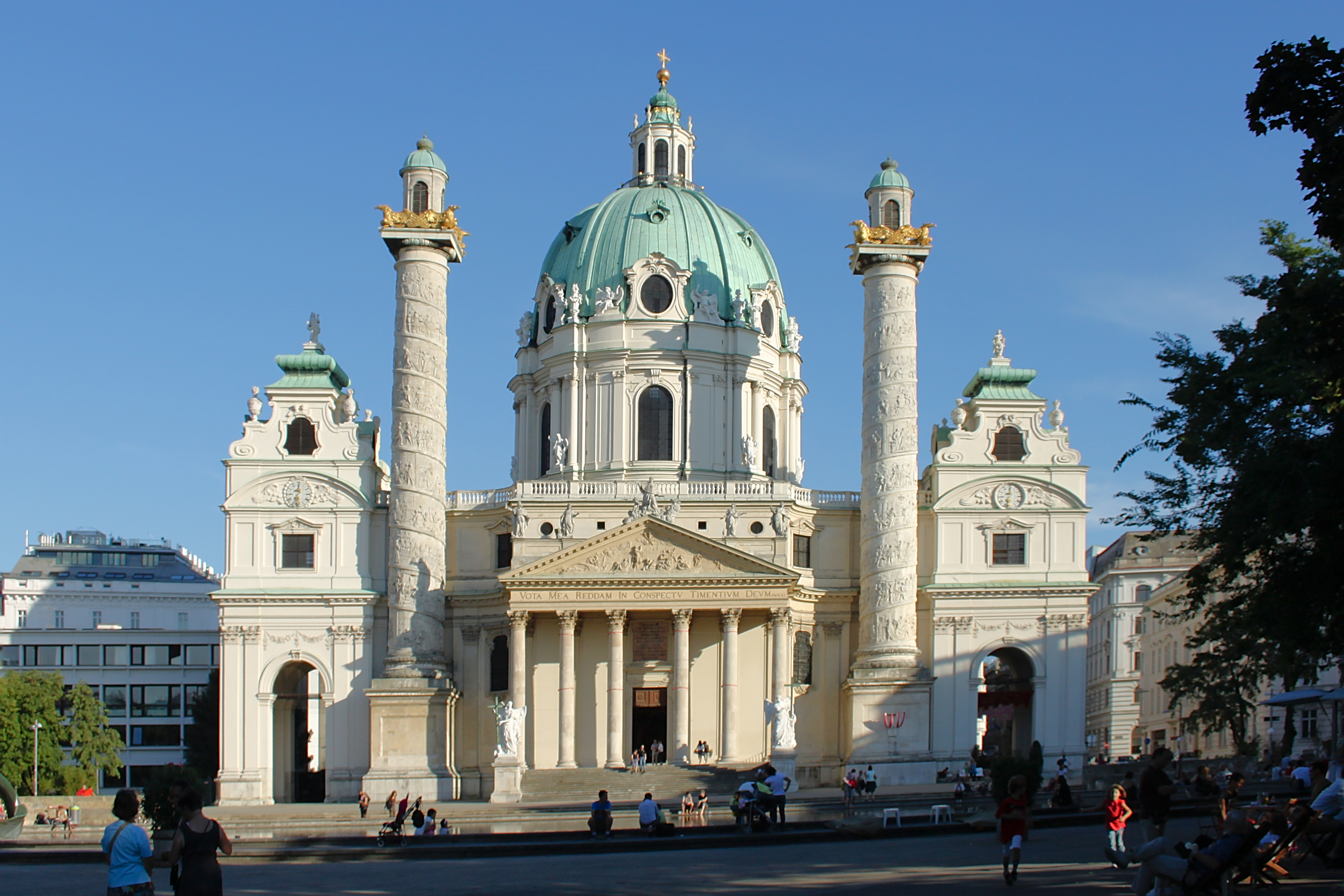 Kath. Pfarrkirche, Pfarrkirche Hl. Karl Borromäus (Karlskirche)